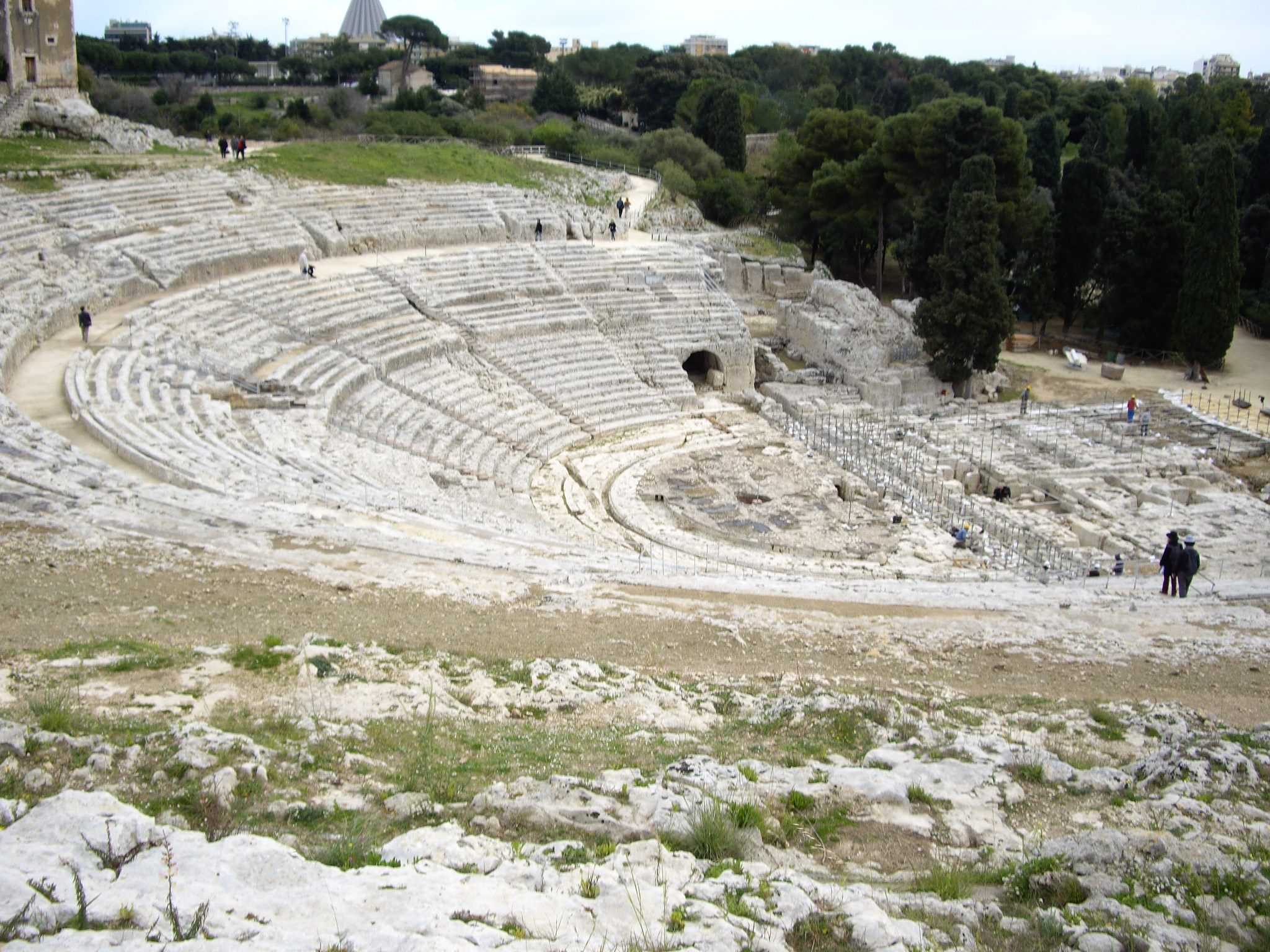 Sirakusako grreziar teatroa